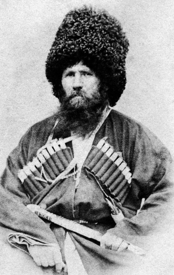 Нохчийн: Оьспан СаӀдалла (йа Бетиг СаIдола) 1830–1870 шаршкахь хилла гӀарваьлла нохчийн тӀемийн бӏаьчча